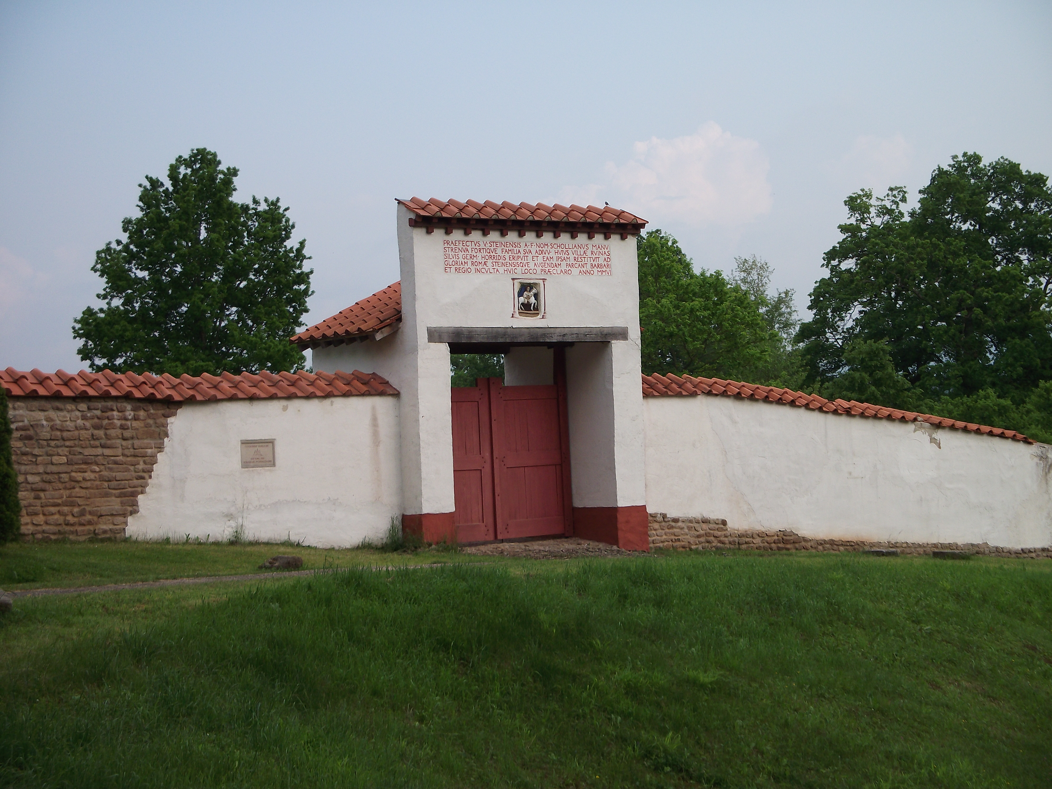 Rekonstruiertes Eingangstor des Römisches Freilichtmuseum Hechingen-Stein